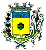 Brasão_do_Município_de_Turmalina